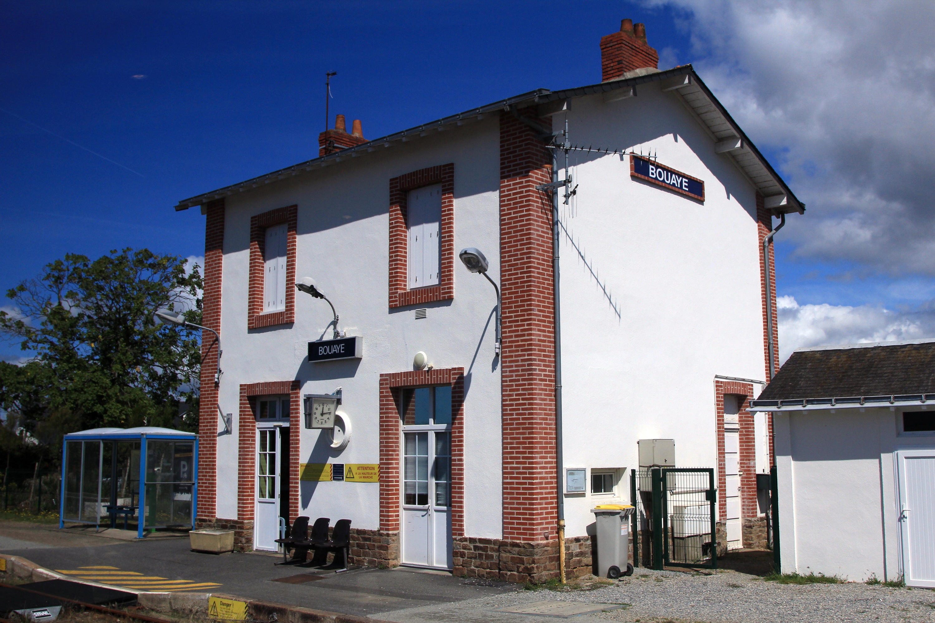 Bâtiment voyageurs de la gare de Bouaye.